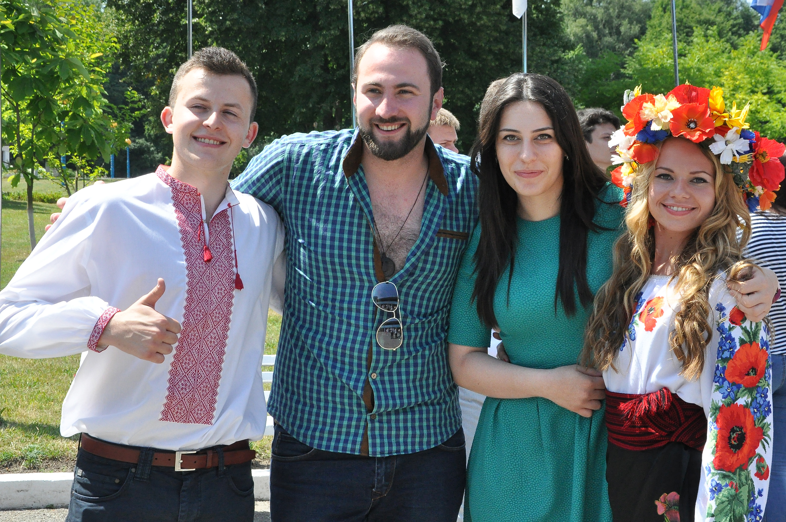 X Літні міжнародні студентські школи в НОК «Червона калина» Тернопільського державного медичного університету імені І. Я. Горбачевського. Українські та грузинські студенти.